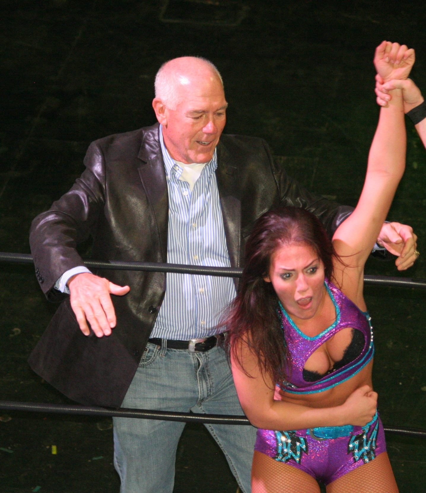 Tully Blanchard et sa fille Tessa.